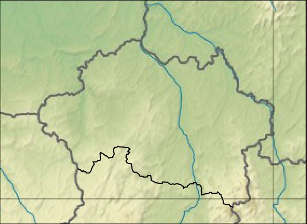 Carte 03 Allier Relief